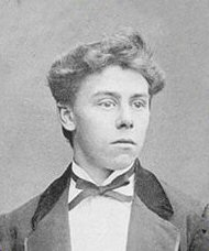 De échte kop van Hendrik Jut (1851-1878).